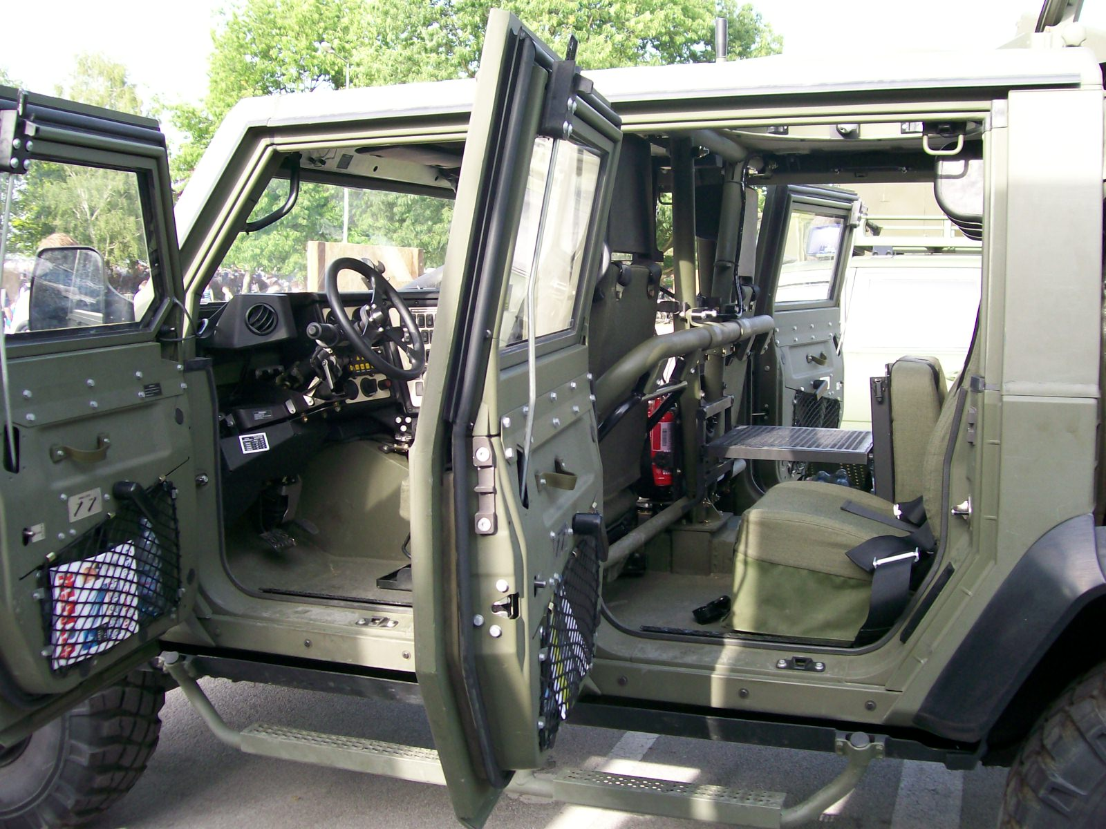 IVECO lako oklopno vozilo Hrvatske vojske